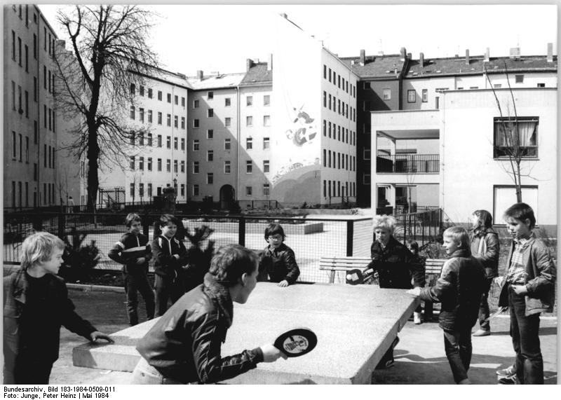 ADN-ZB-Junge-9.5.84-Berlin: Arkonaplatz- Ideale Spielbedingungen wurden für die Kinder im Wohngebiet um den Arkonaplatz geschaffen. Nichts erinnert hier mehr an die engen, lichtlosen Hinterhöfe, in denen nur Platz für Klopfstange und Mülltonnen war. 3000 Wohnungen wurden in diesem Altbaugebiet im Stadtbezirk Mitte von 1972 bis 1983 modernisiert oder instandgesetzt. Das sind bessere Lebensbedingungen für mehr als 8000 Einwohner.